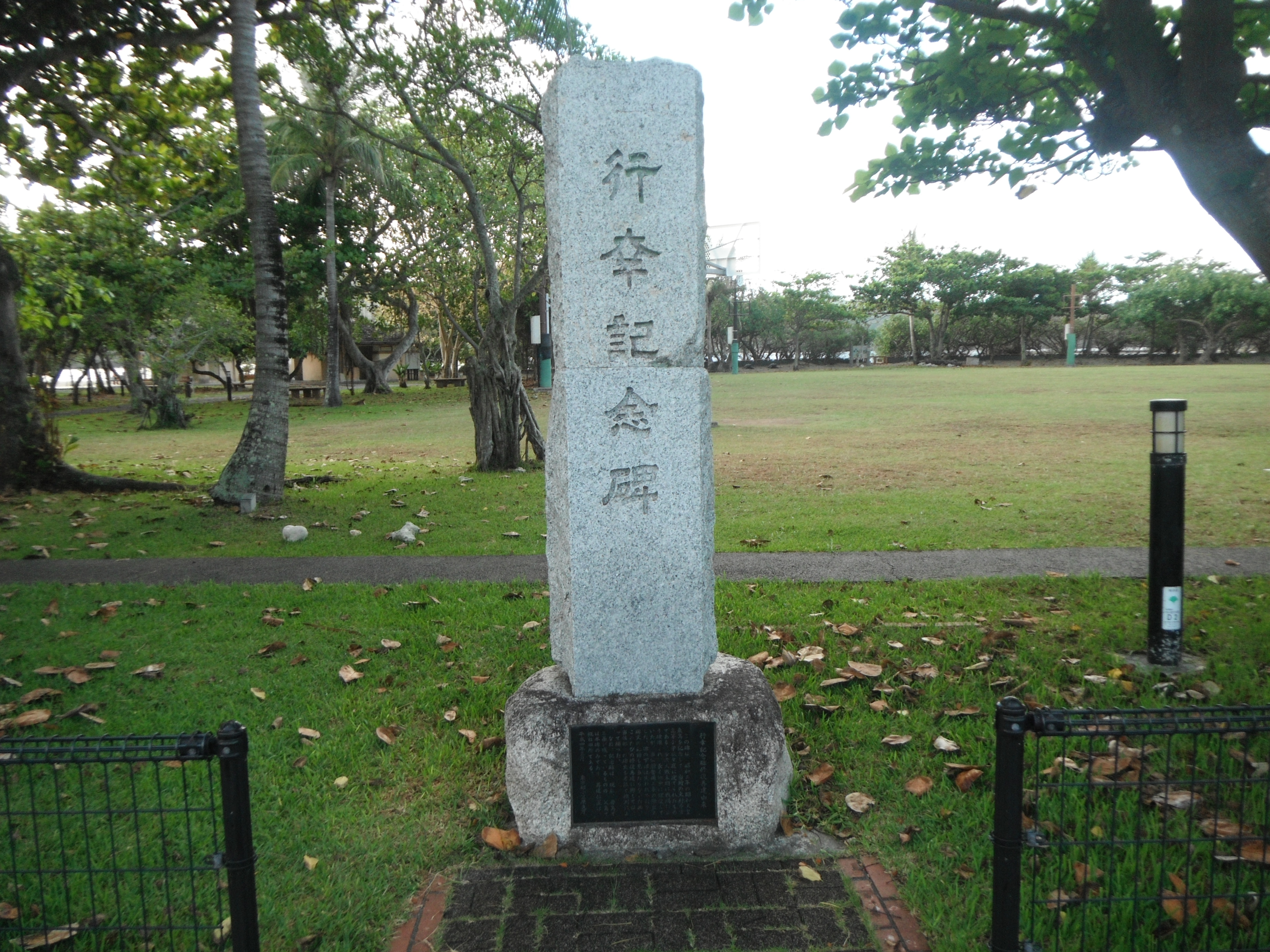 小笠原・父島にある昭和２年の行幸記念碑